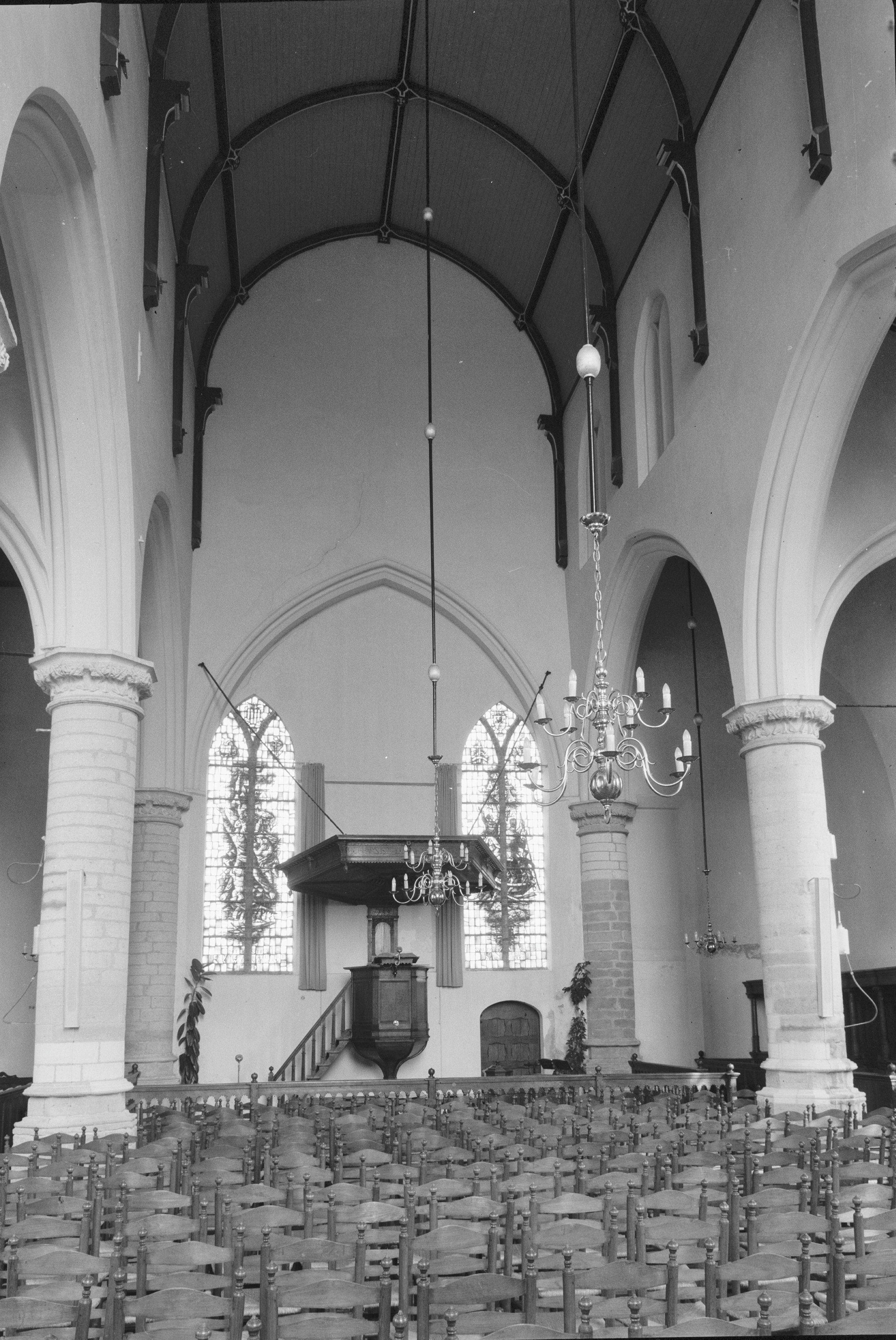 Nederlands Hervormde Kerk: preekstoel en Gedenkramen Watersnoodramp (1956) van Wim Wagemans